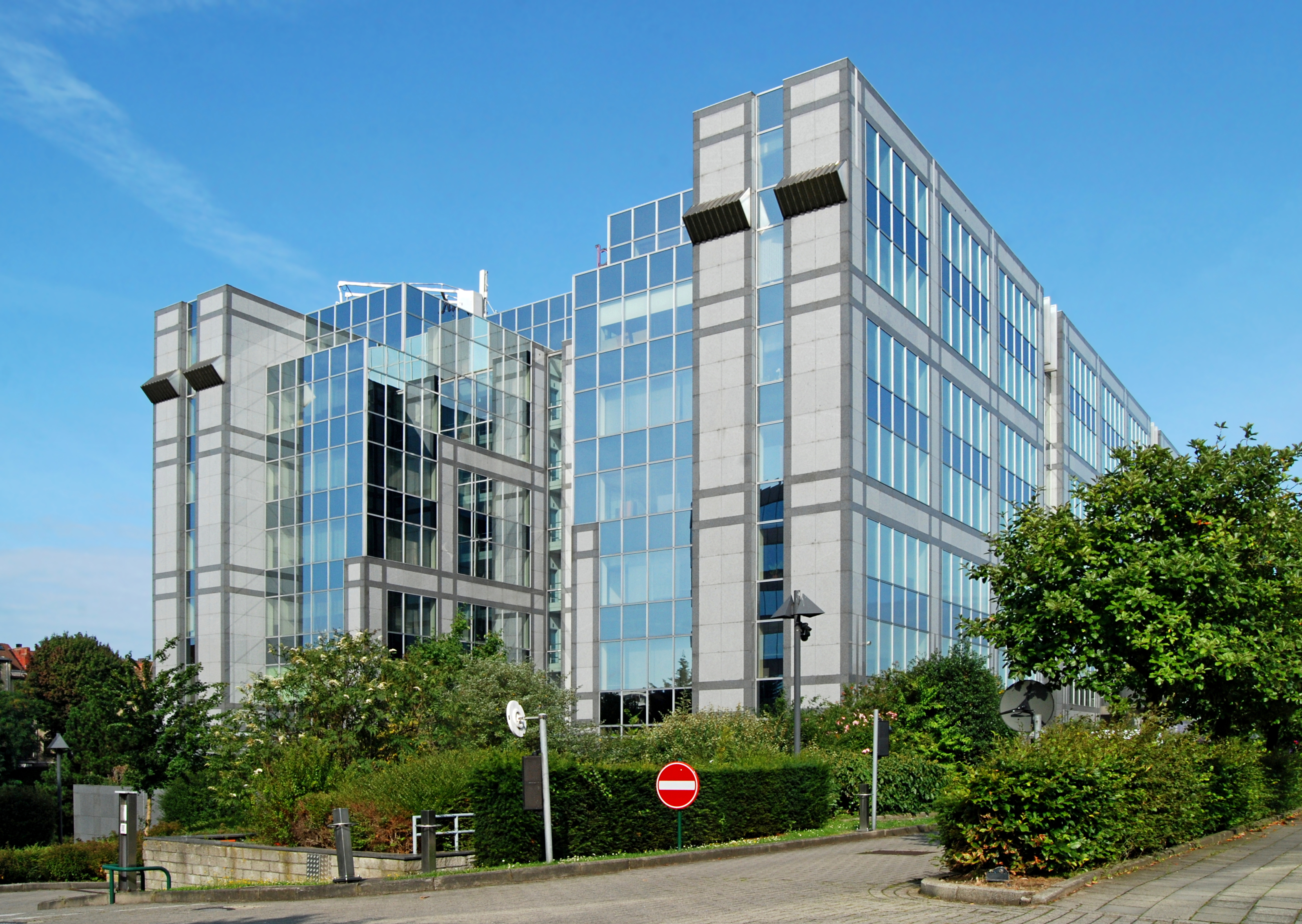 Belgique - Bruxelles - Boulevard de la Plaine 1 (architecture postmoderne - Bureau d'architecture Henri Montois - 1995) :ancien siège de Citibank en Belgique, puis siège de Beobank